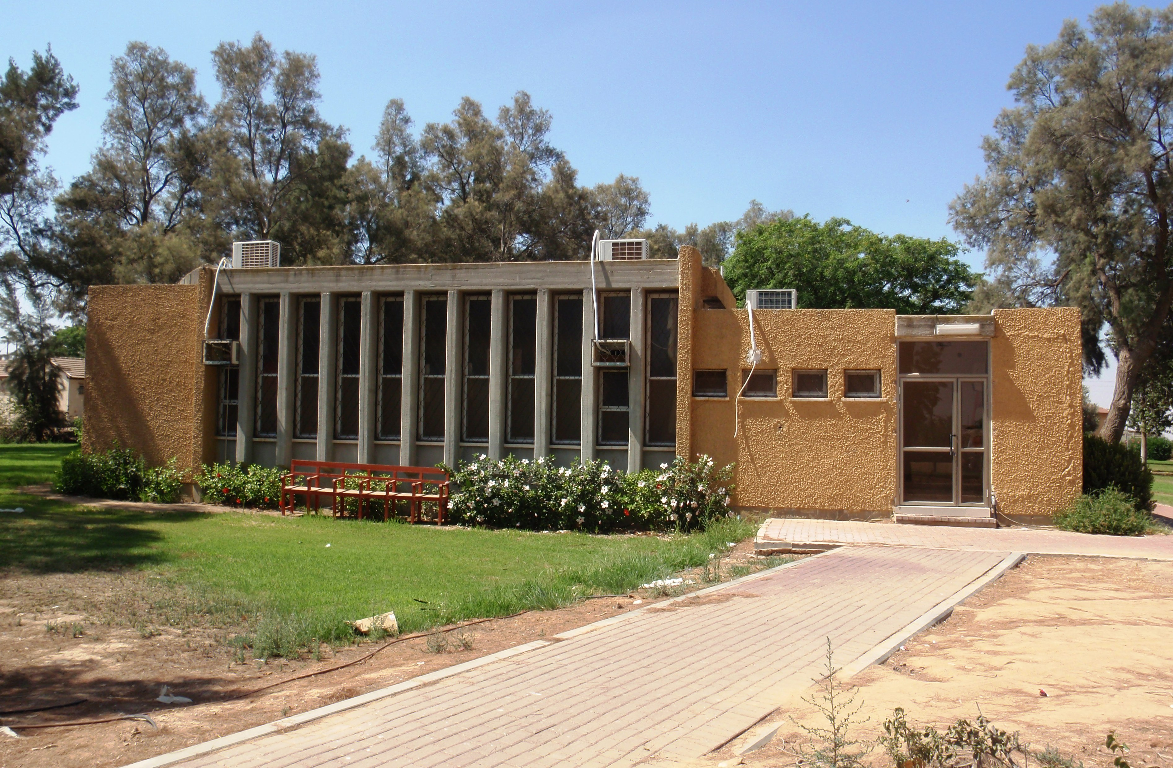 בית הכנסת במושב שדה צבי על שם הרב יעקב טובול זצ"ל.